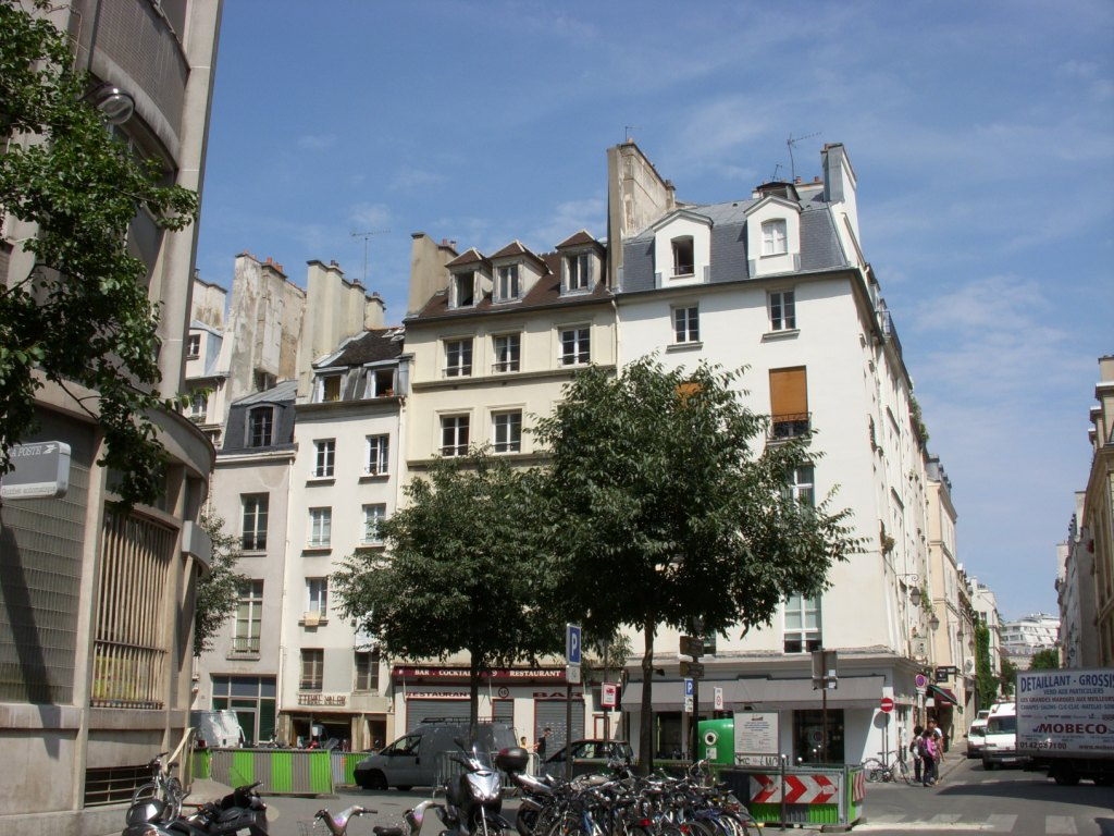 Rue Pastourelle, Paris, 3e